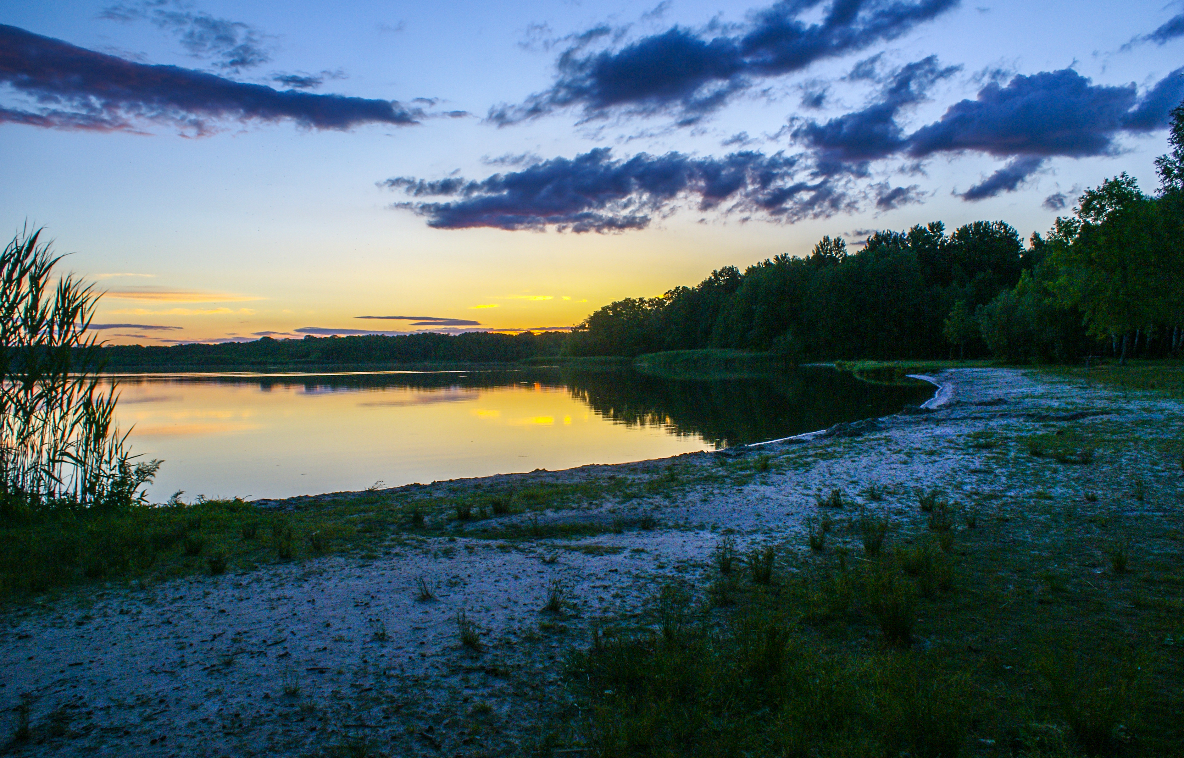 Naturschutzgebiet Rangsdorfer See in Brandenburg